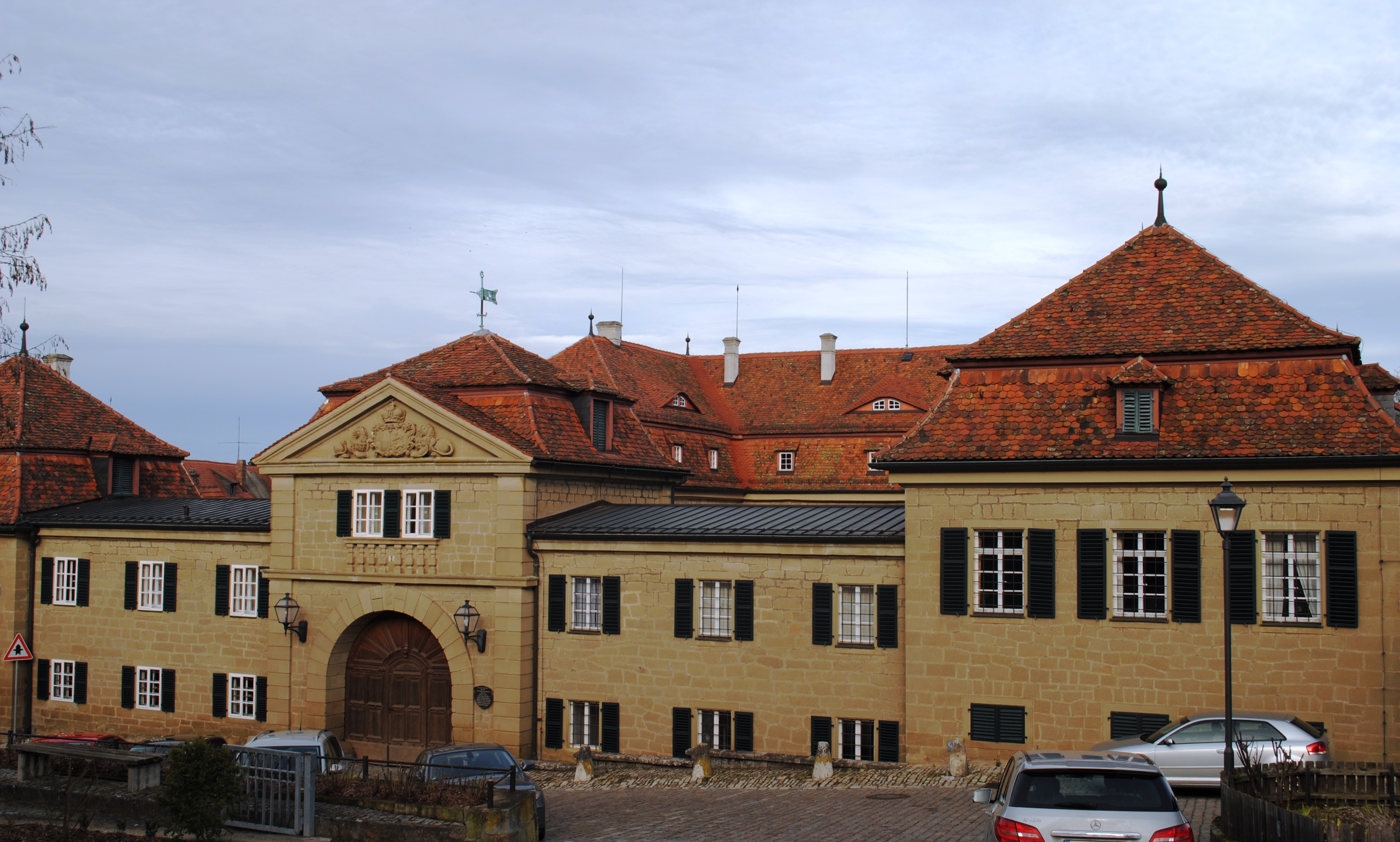 Torbauten, Schloss Castell